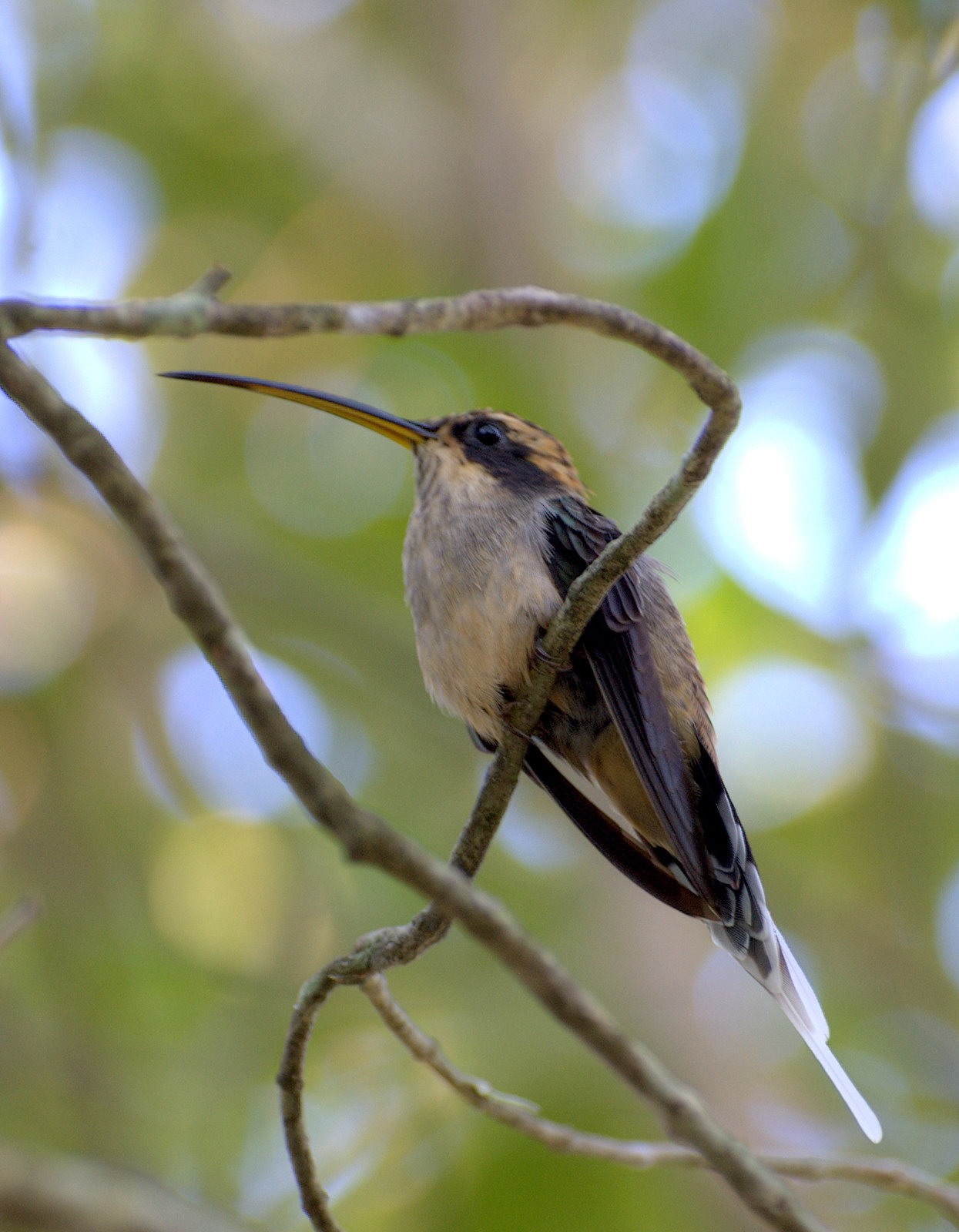 Phaethornis eurynome, Chácara Antonio Wuo, Mogi das Cruzes-SP (Brazil)